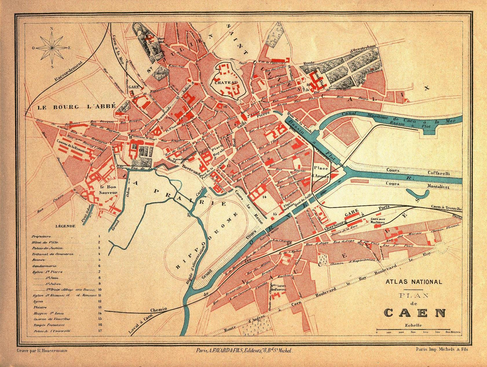 Plan de Caen à la Belle-Epoque